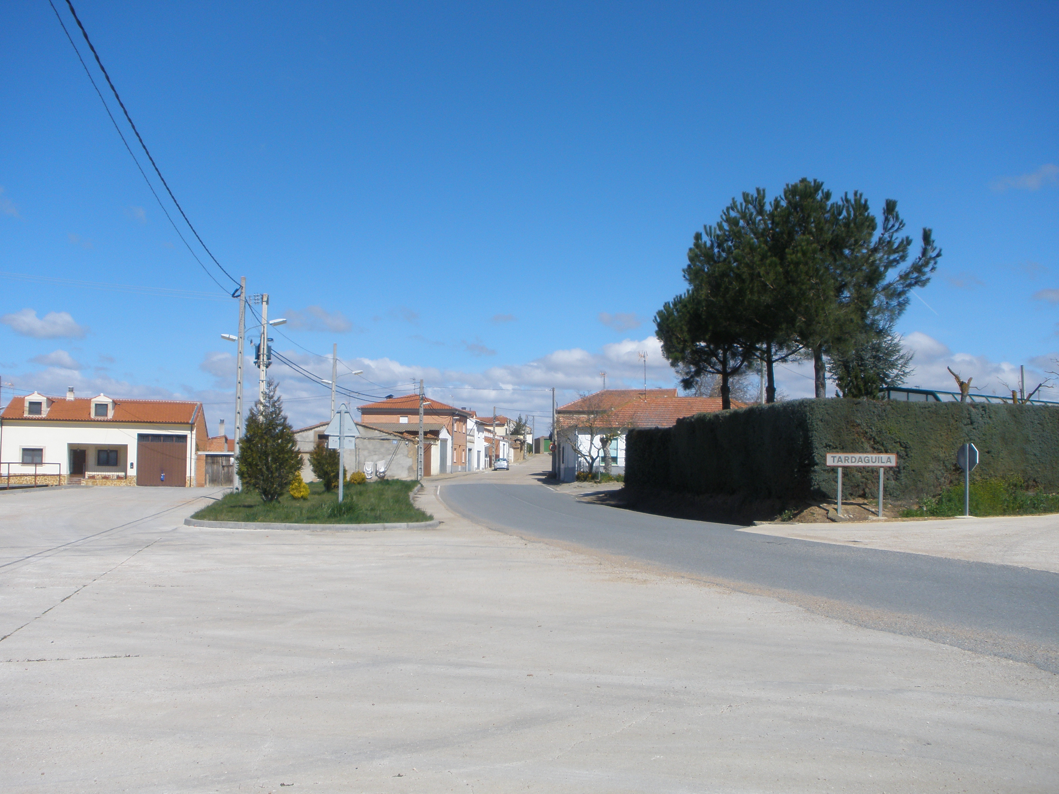 Esta es la entrada principal del pueblo.